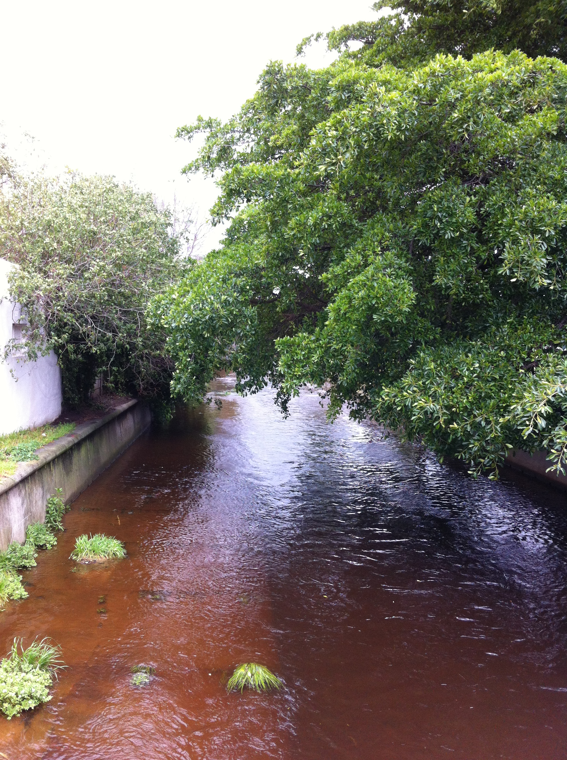 Liesbeek River at Rosebank, looking upstream